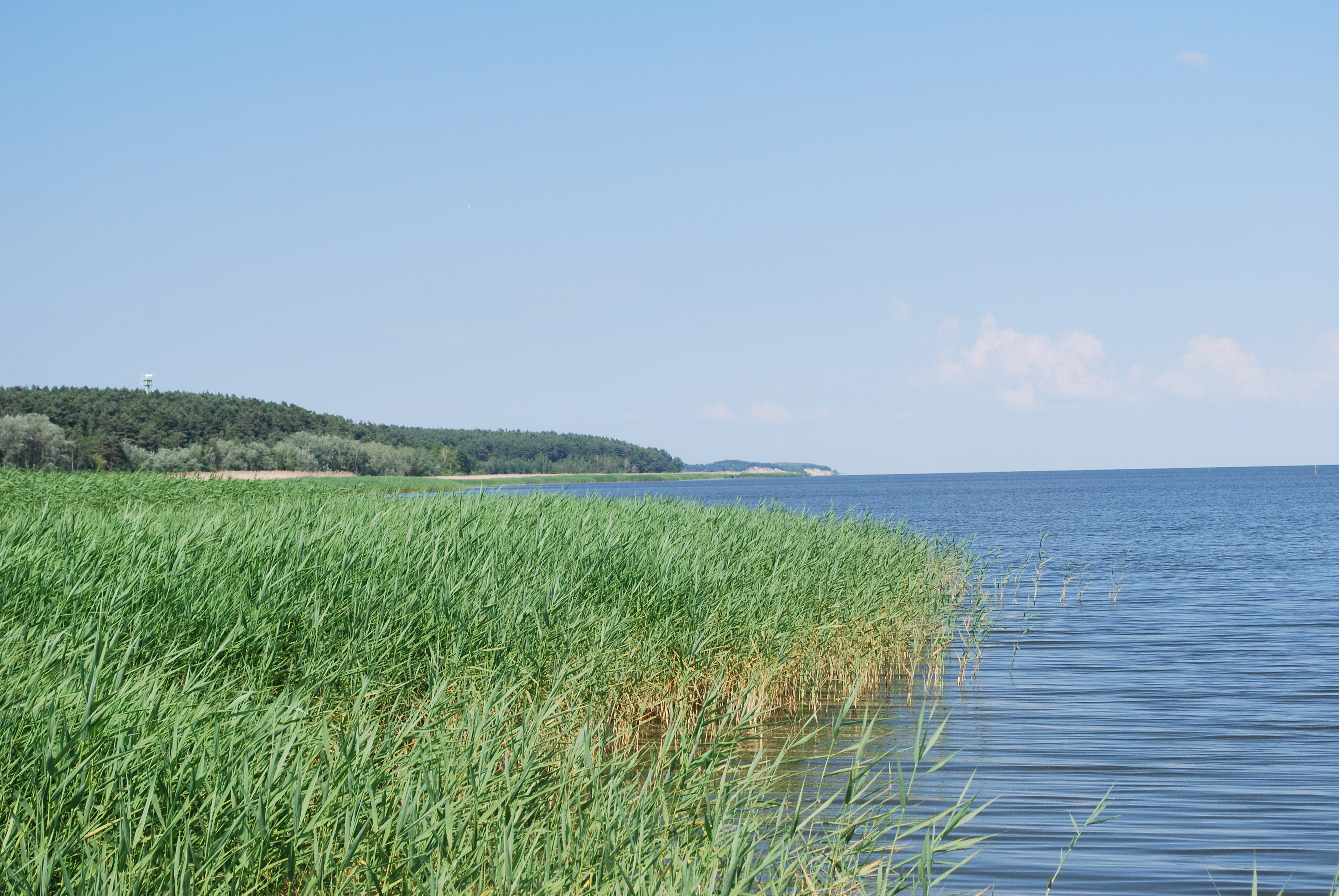 Widok w kierunku granicy z Piasków na Mierzei Wiślanej.